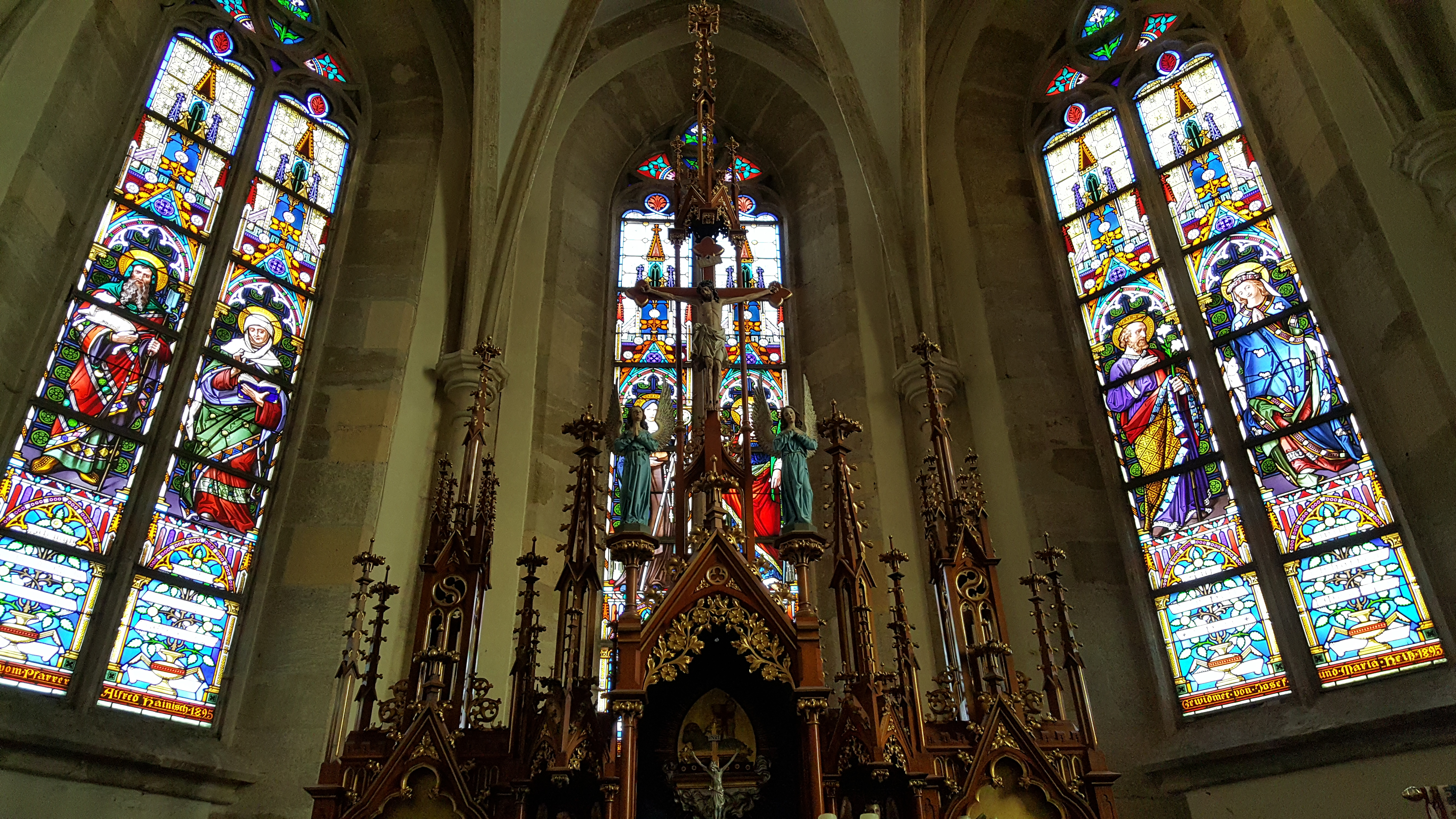 Altar und Glasfenster Wallfahrtskirche Kollmitzberg